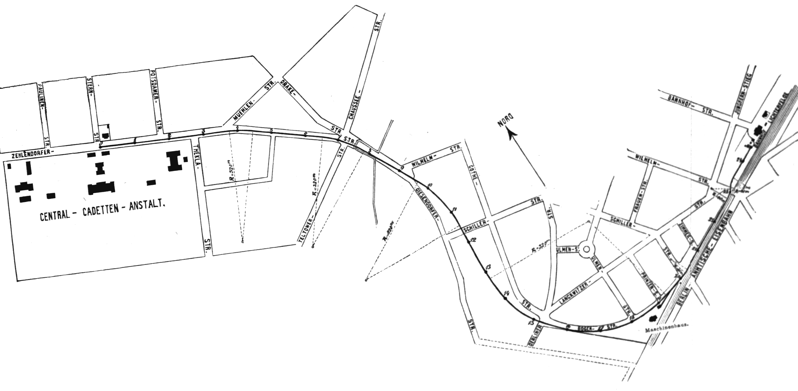 Strecke der ersten elektrischen Straßenbahn in Lichterfelde (Berlin)